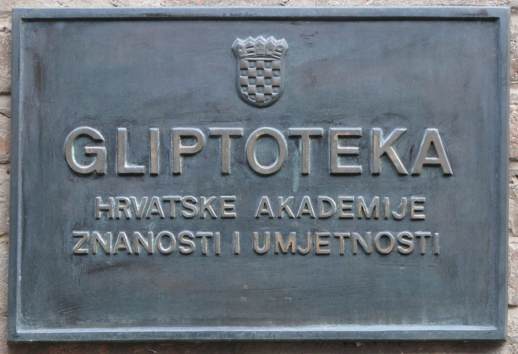 Ploča Gliptoteke HAZU